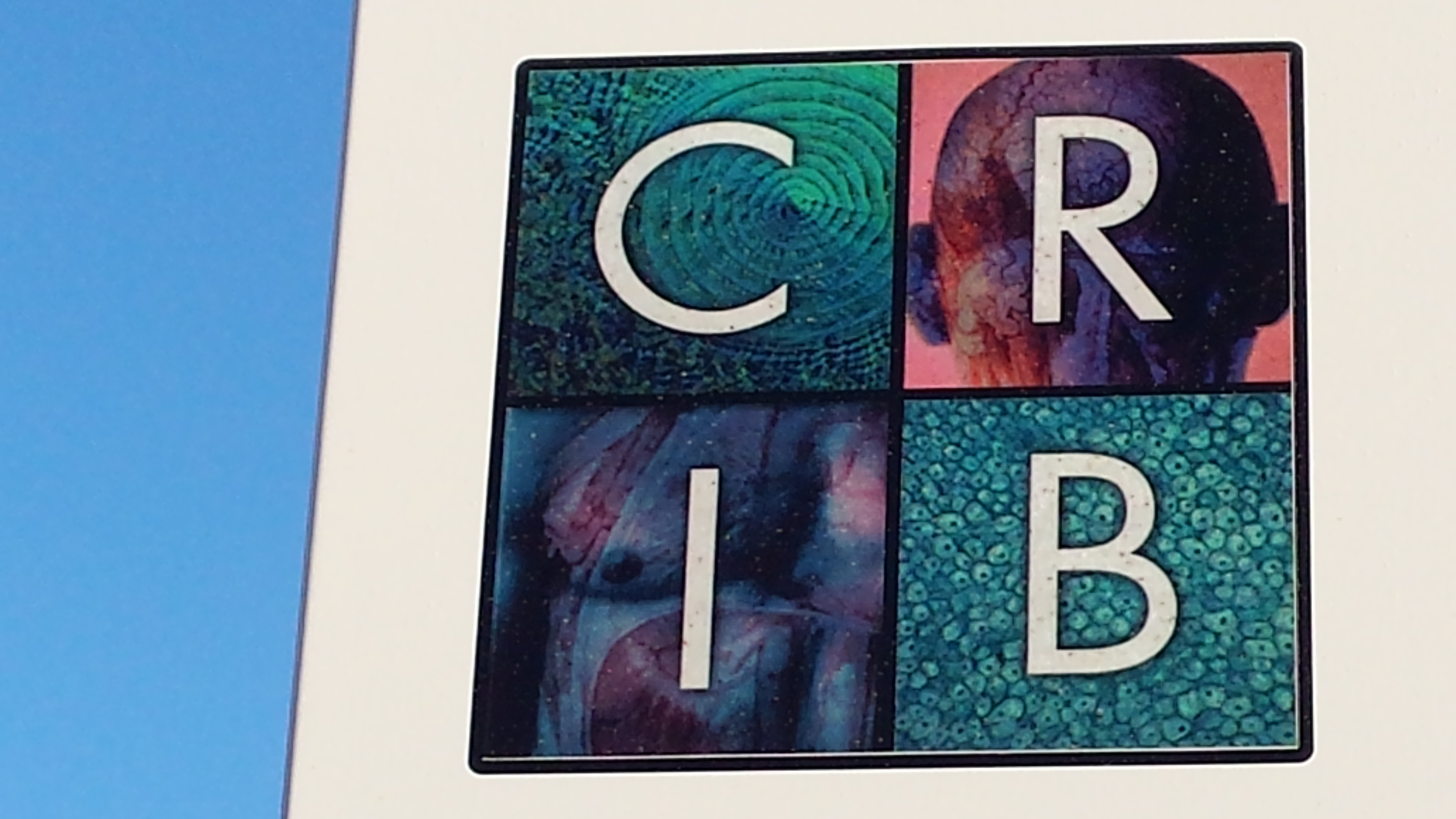 Logo del CRIB situado en una señal.